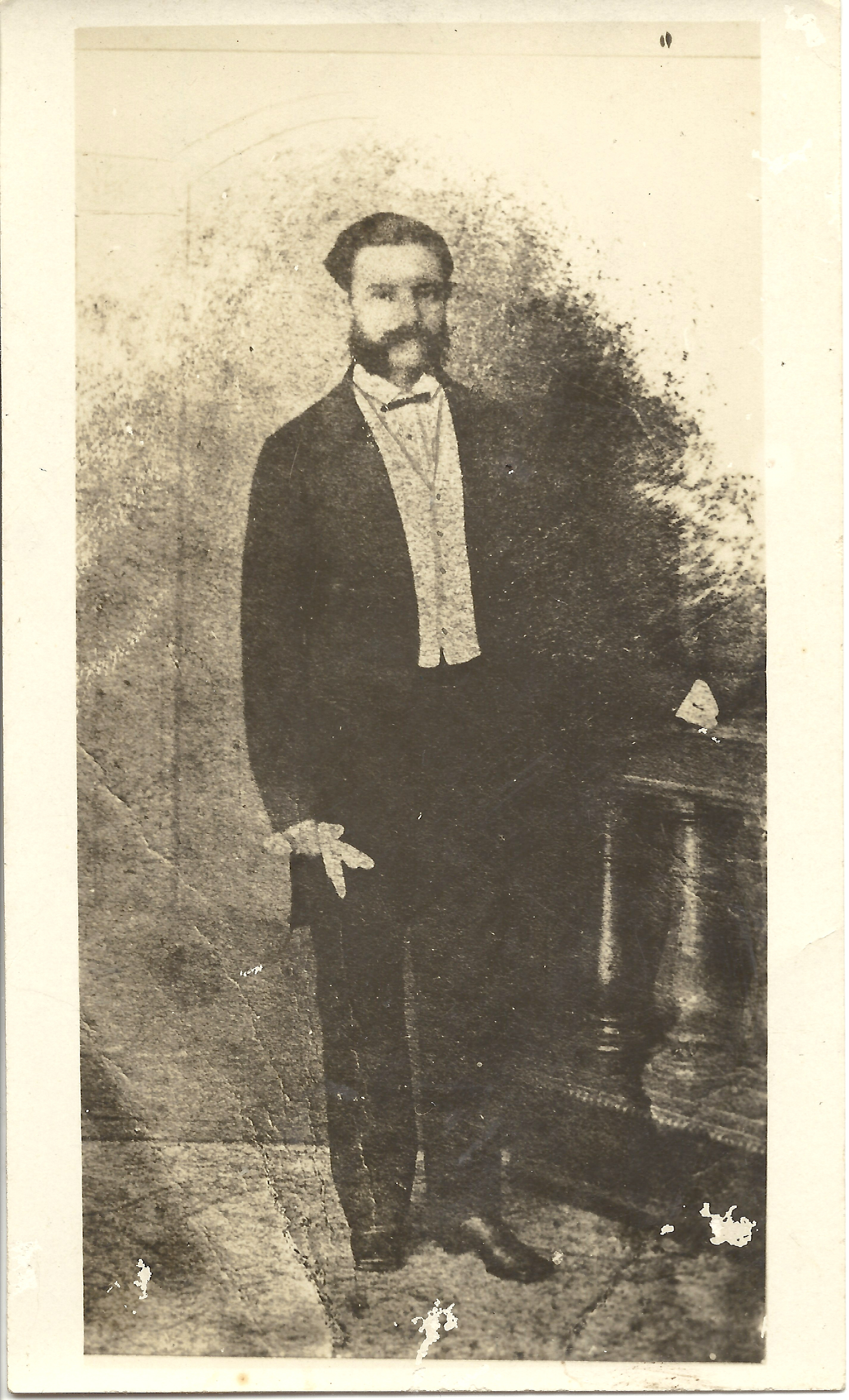 Πολυχρονης Κωνσταντας, Βουλευτης Κερκυρας, 1864-1892